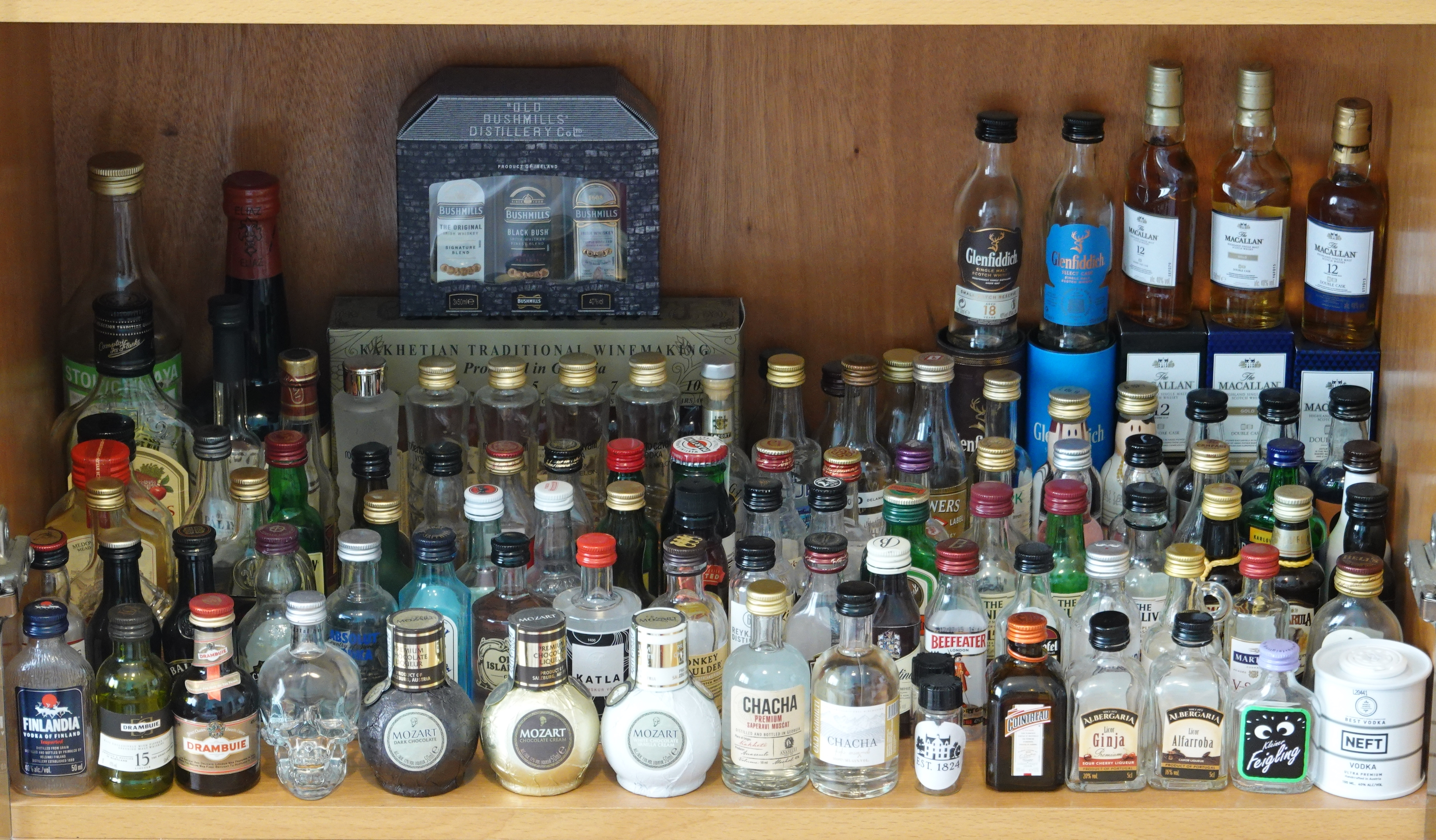 מיניאטורות של משקאות חריפים